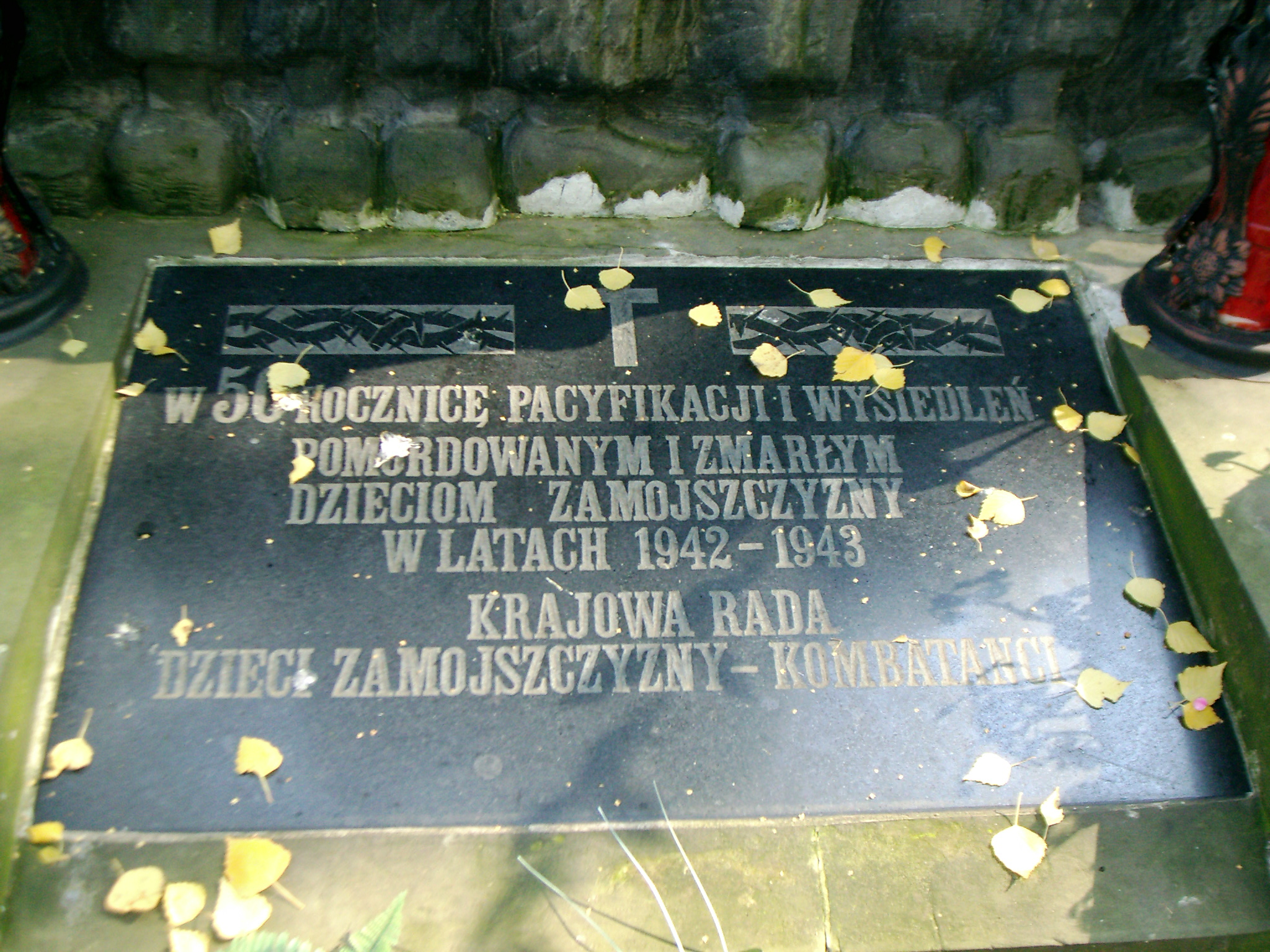 Pomnik poświęcony Dzieciom Zamojszczyzny - napis